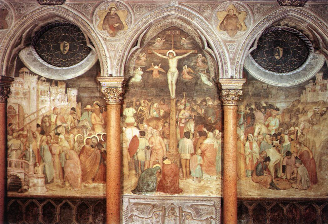 (dettaglio)